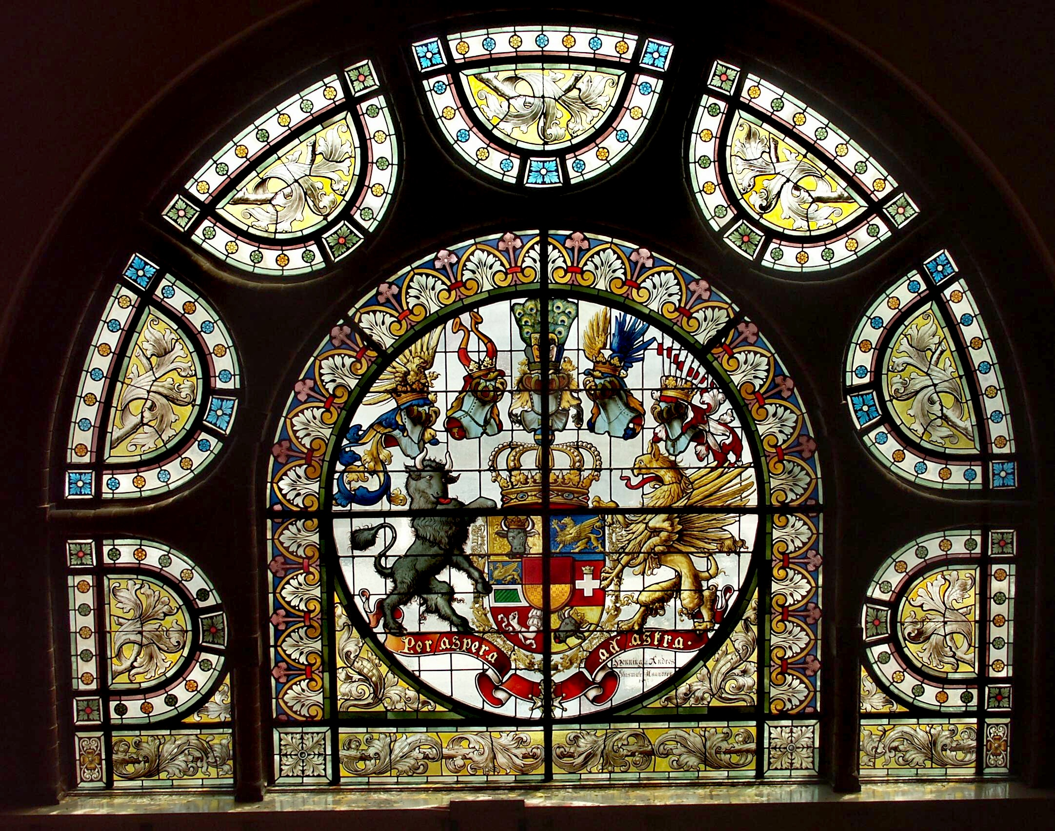 Das große Wappen Mecklenburg in dritten Stock der Rbd Schwerin. Es ist nach Osten gerichtet, dadurch hervorragend beleuchtet. Es ist das größte Landeswappen in Bleiglas. Henning Andres, Glasmaler aus Hannover, fertigte es 1897. 1989 flatterten die Glasscheiben schon marode im Wind. Jürgen Gerner, der Rangiertechniker der Rbd Schwerin und Mitglied des Runden Tisches der Bürgerbewegungen der Rbd, forderte die Präsidentin der Rbd im Herbst 1989 auf, das Fenster mit dem Landeswappen zu schützen und dafür nun endlich Geld für die dringende Restaurierung einzustellen. Sie nahm sich nun, unter den sich ändernden politischen Verhältnissen, dieser Forderung an. Sie ließ das Fenster sichern und 1990 begann die seit Jahren überfällige Restauration.